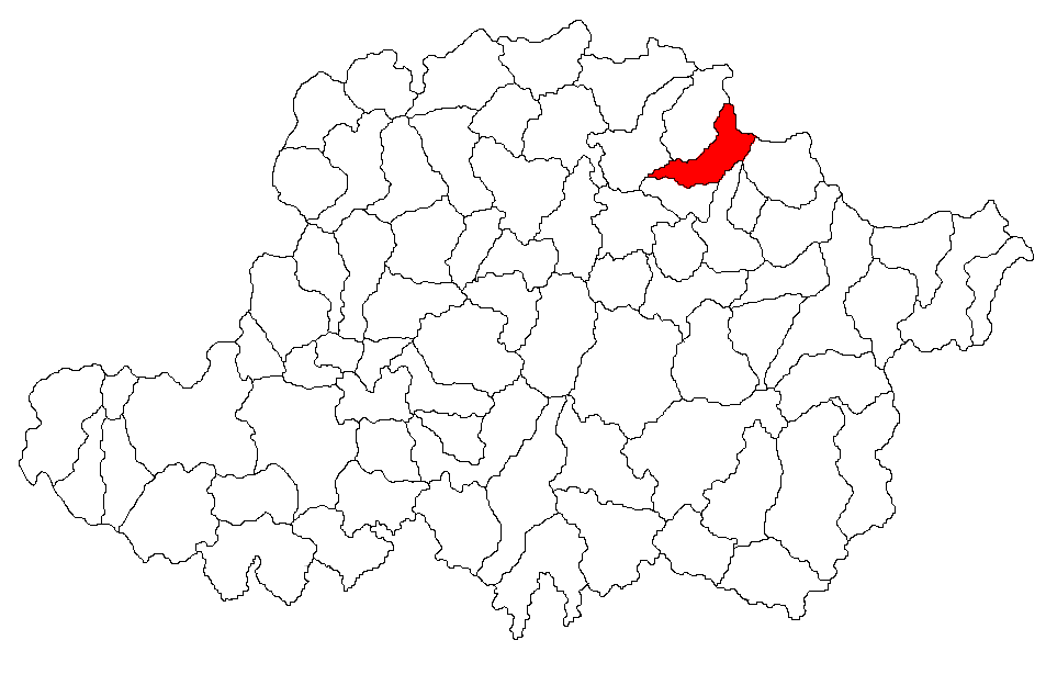 Categorie:Hărţi ale judeţului Arad